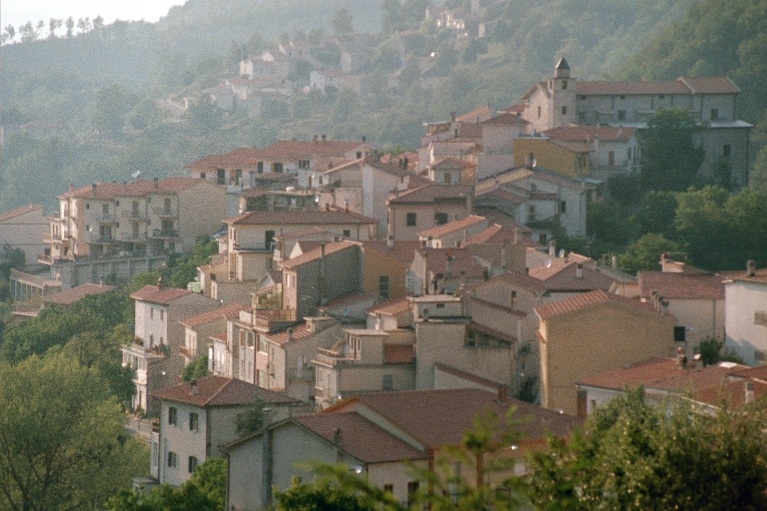 San Biagio Saracinesco (vue depuis Colle Belizzo)